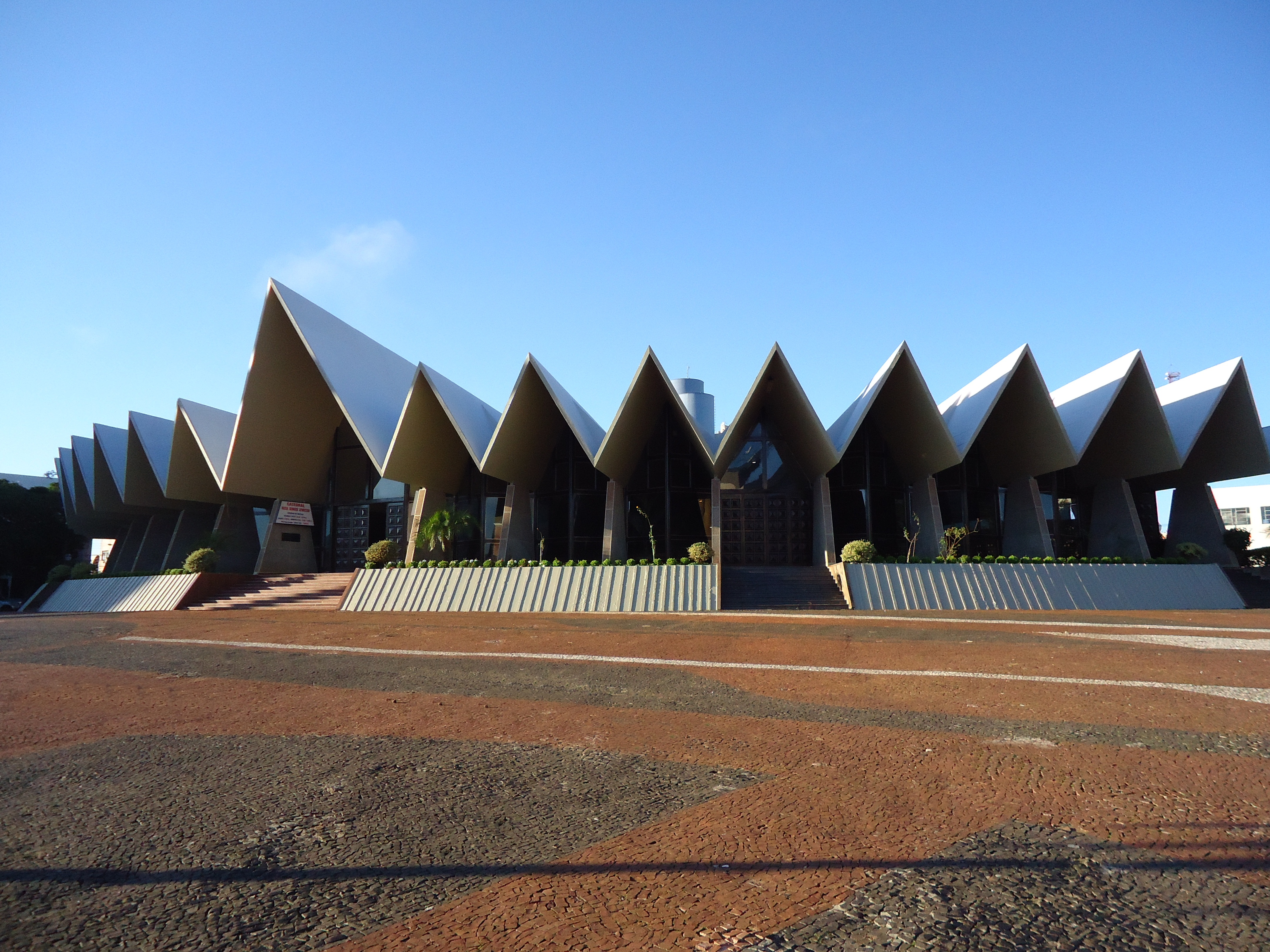 Catedral Nossa Senhora Aparecida - Cascavel - PR Brasil